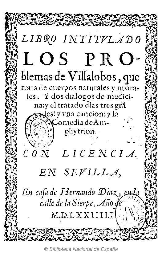 Libro intitulado Los problemas de Villalobos : que trata de cuerpos naturales y morales ; y dos dialogos de medicina ; y el tratado d[e]las tres grãdes ; y vna cancion ; y la comedia de Amphytrion Autor: López de Villalobos, Francisco (1473-1549) Fecha: 1574 Datos de edición: En Seuilla en casa de Hernando Diaz ...